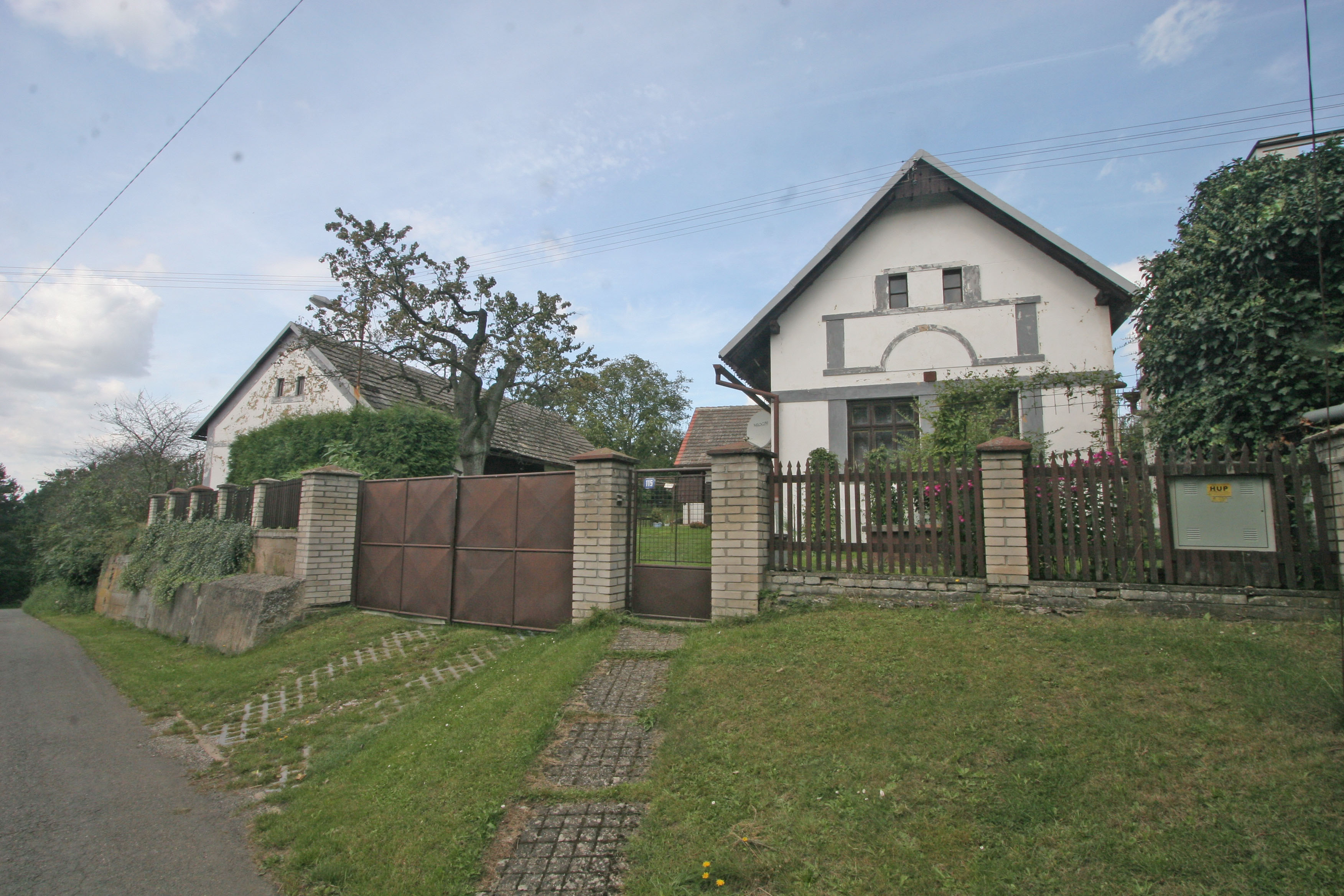 Bílý Kámen čp. 115